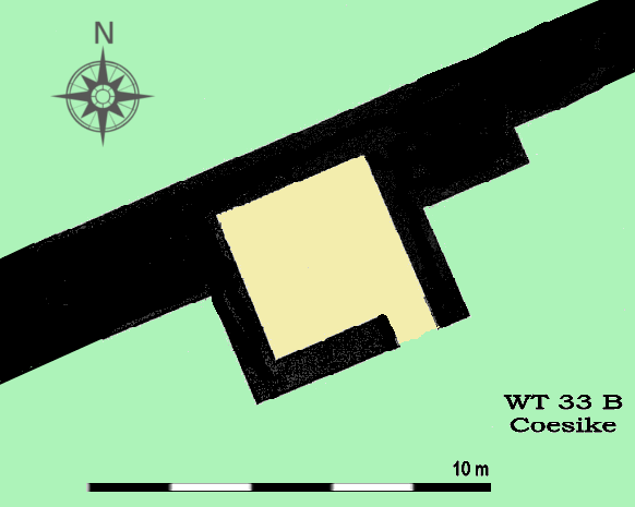 Befundskizze des Wachturms 33B/Coesike, Hadrianswall (GB)